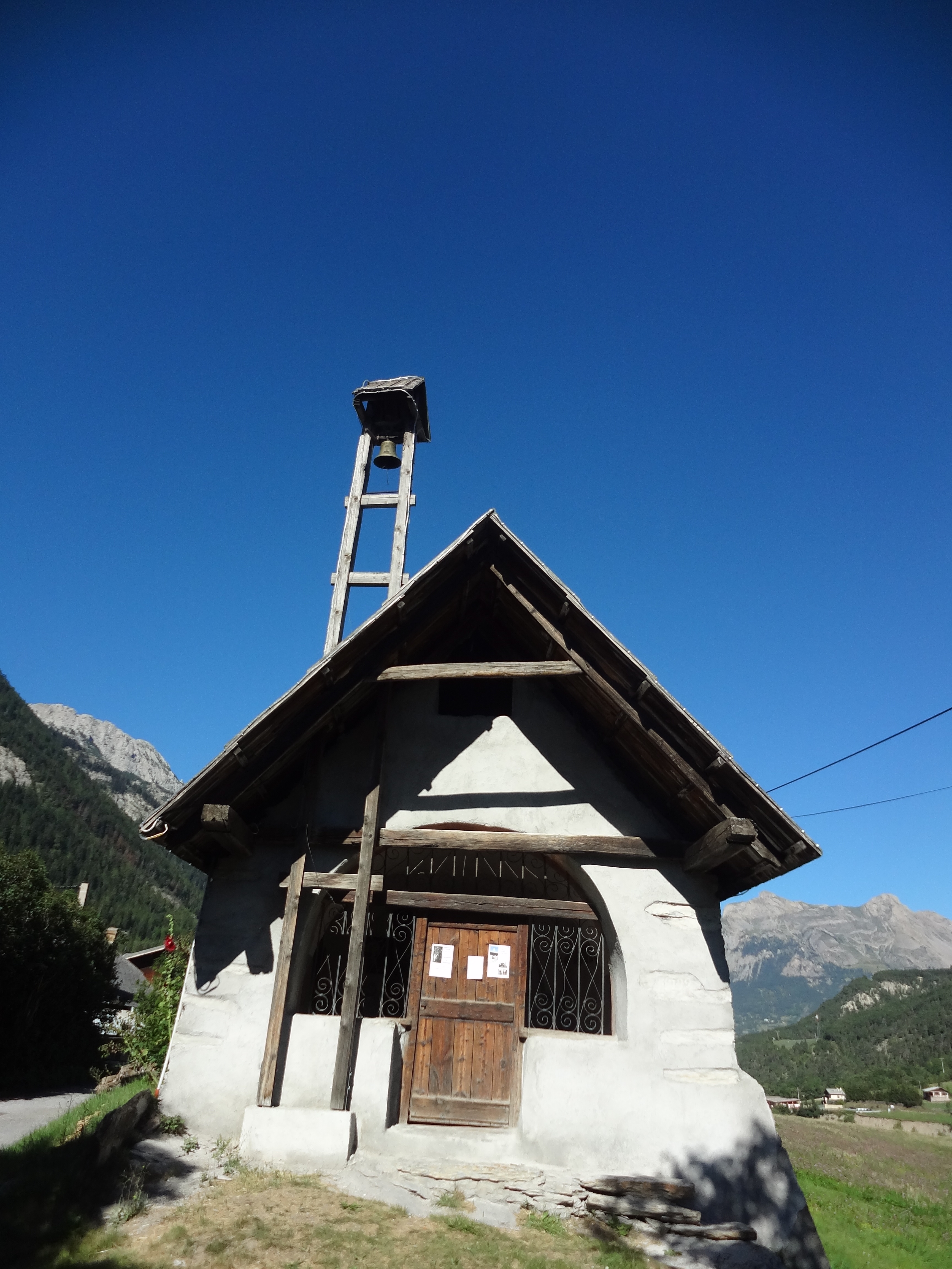 Chapelle des Guérins, commune des Thuiles (France, 04)